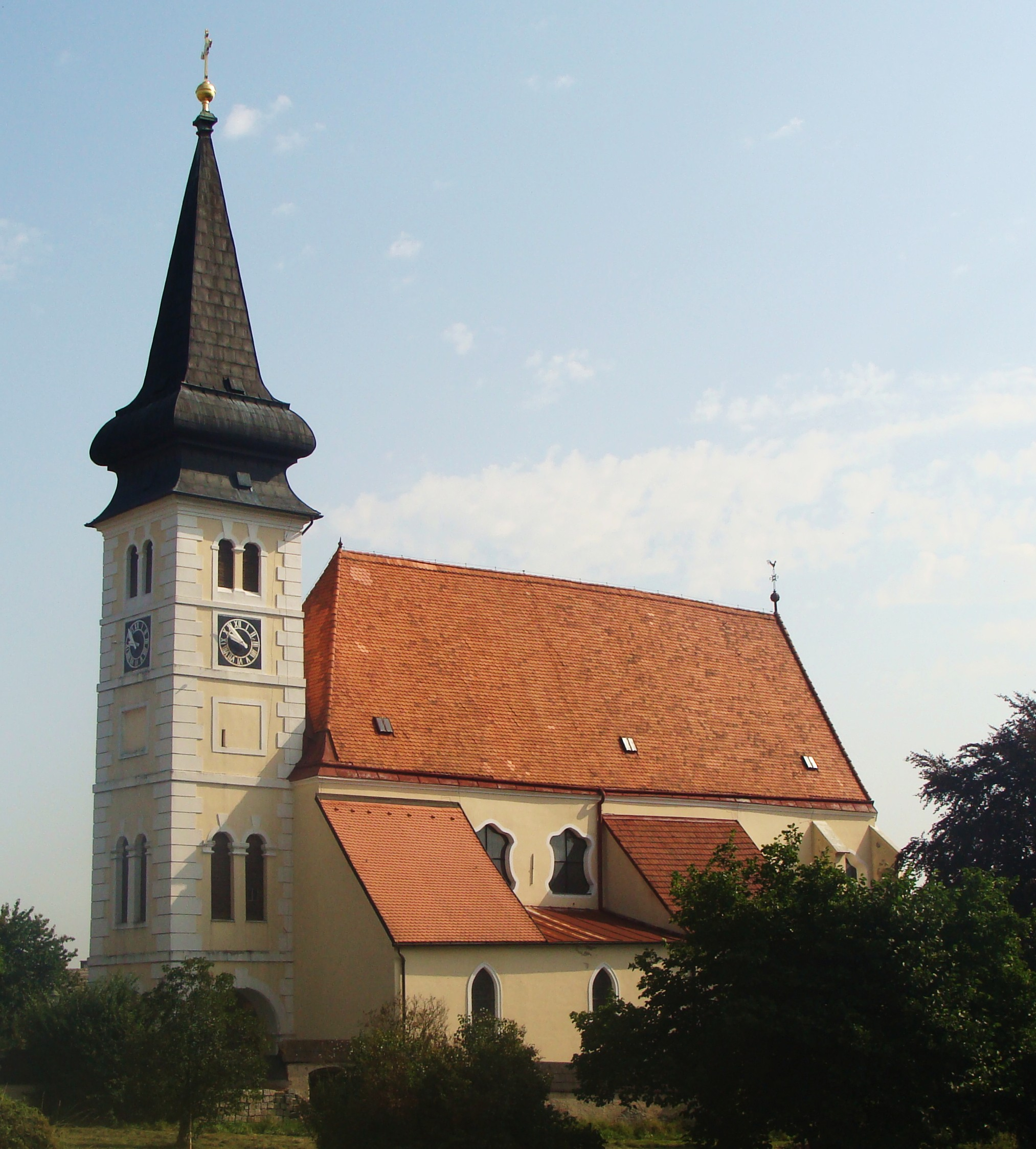 Kath. Pfarrkirche hl. Xystus Ferschnitz